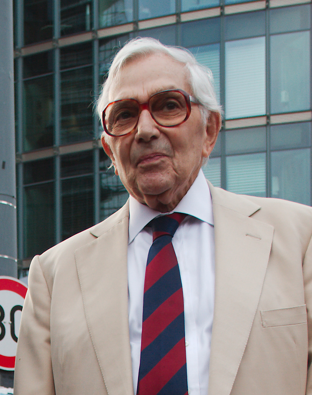 Daneben Bürgermeister Wowereit